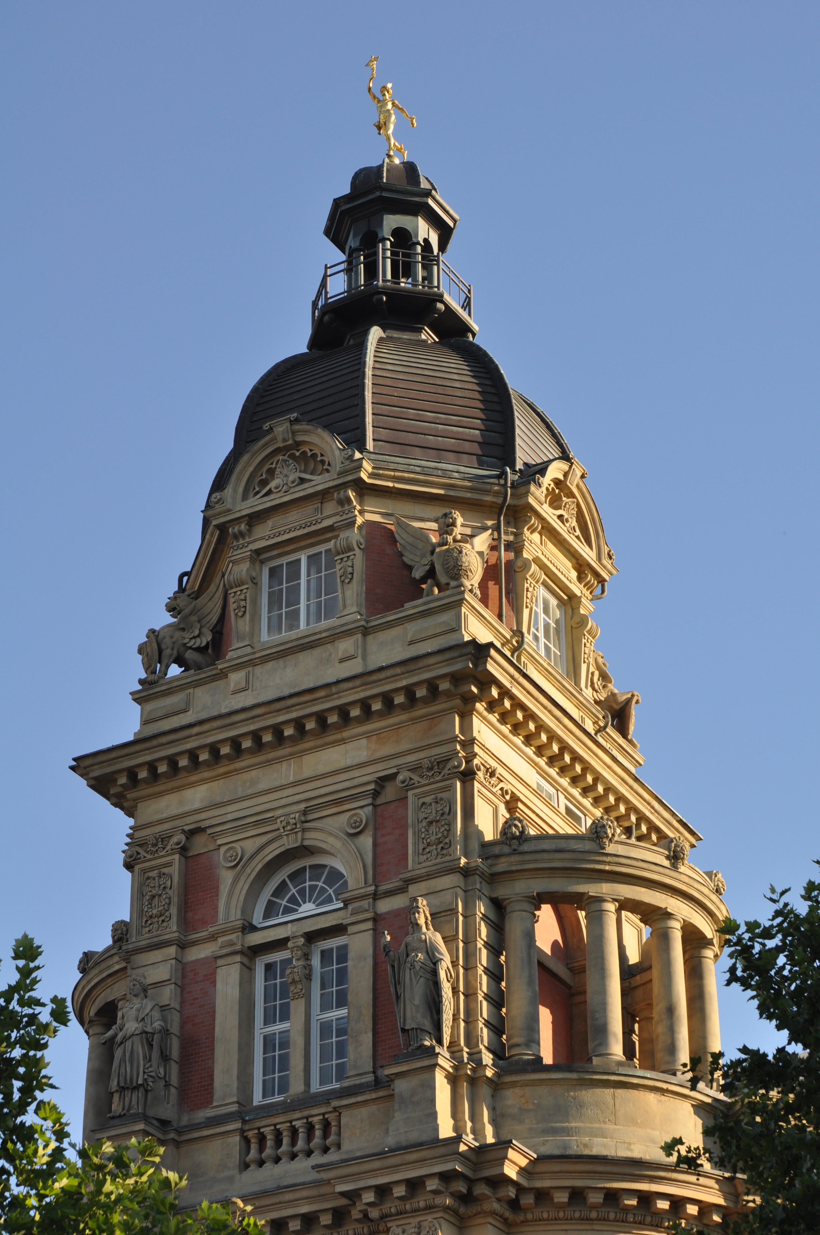 Kuppel der ehemaligen Oberpostdirektion am Stephansplatz in Hamburg-Neustadt mit Hermesstatue. This is a photograph of an architectural monument.